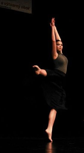 Baletní pozice "noha stranou".